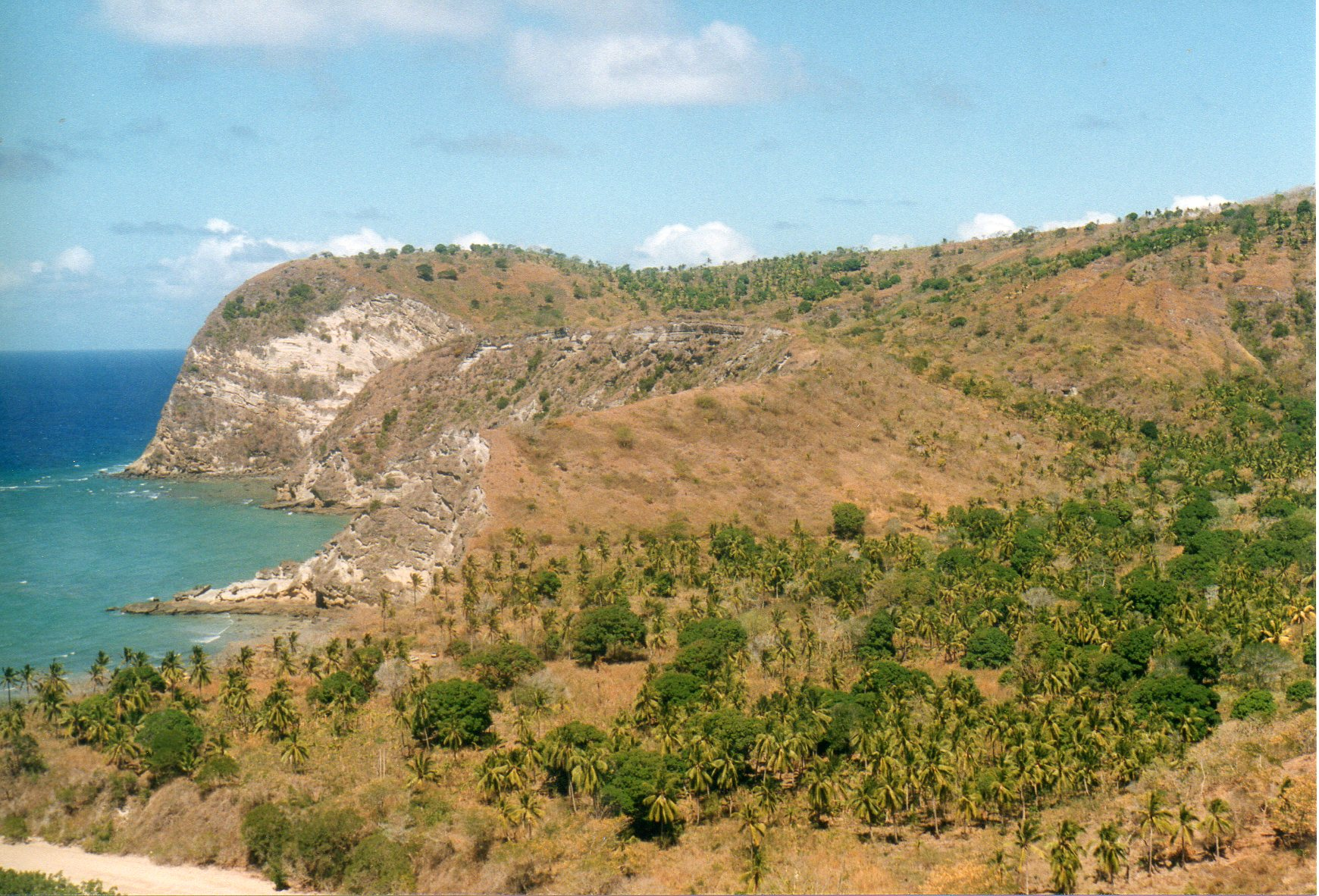 Hauteurs de Moya